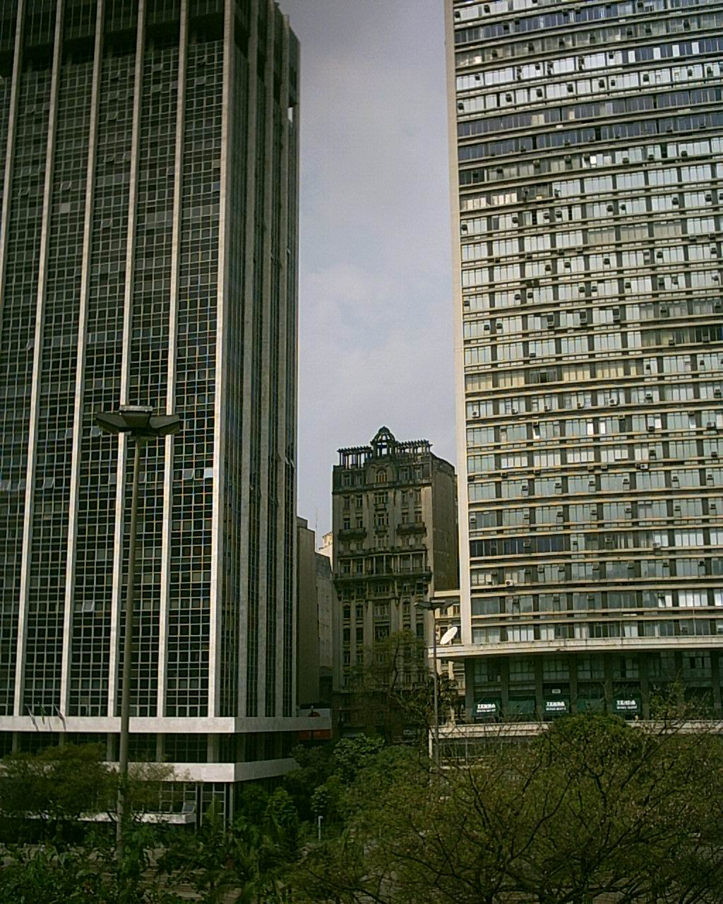 São Paulo: Die gesamte Innenstadt ist ein einziges Hochhausmeer. Die Gewalt, mit der diese die Stadtstruktur prägen, wird am Kontrast zu einem in den 30er Jahren errichteten „Hochhaus“ verdeutlicht.